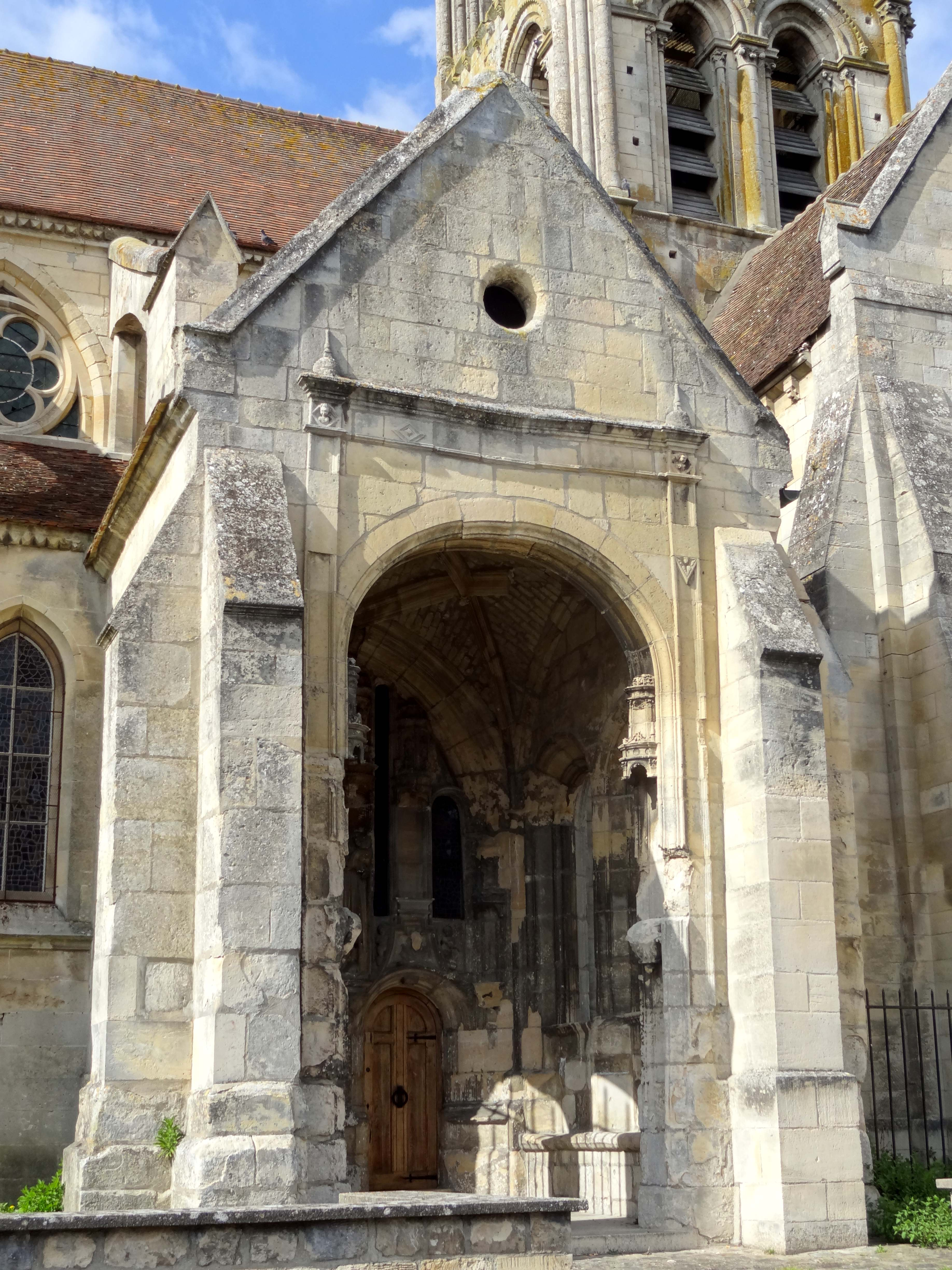 Le porche devant le portail méridional.